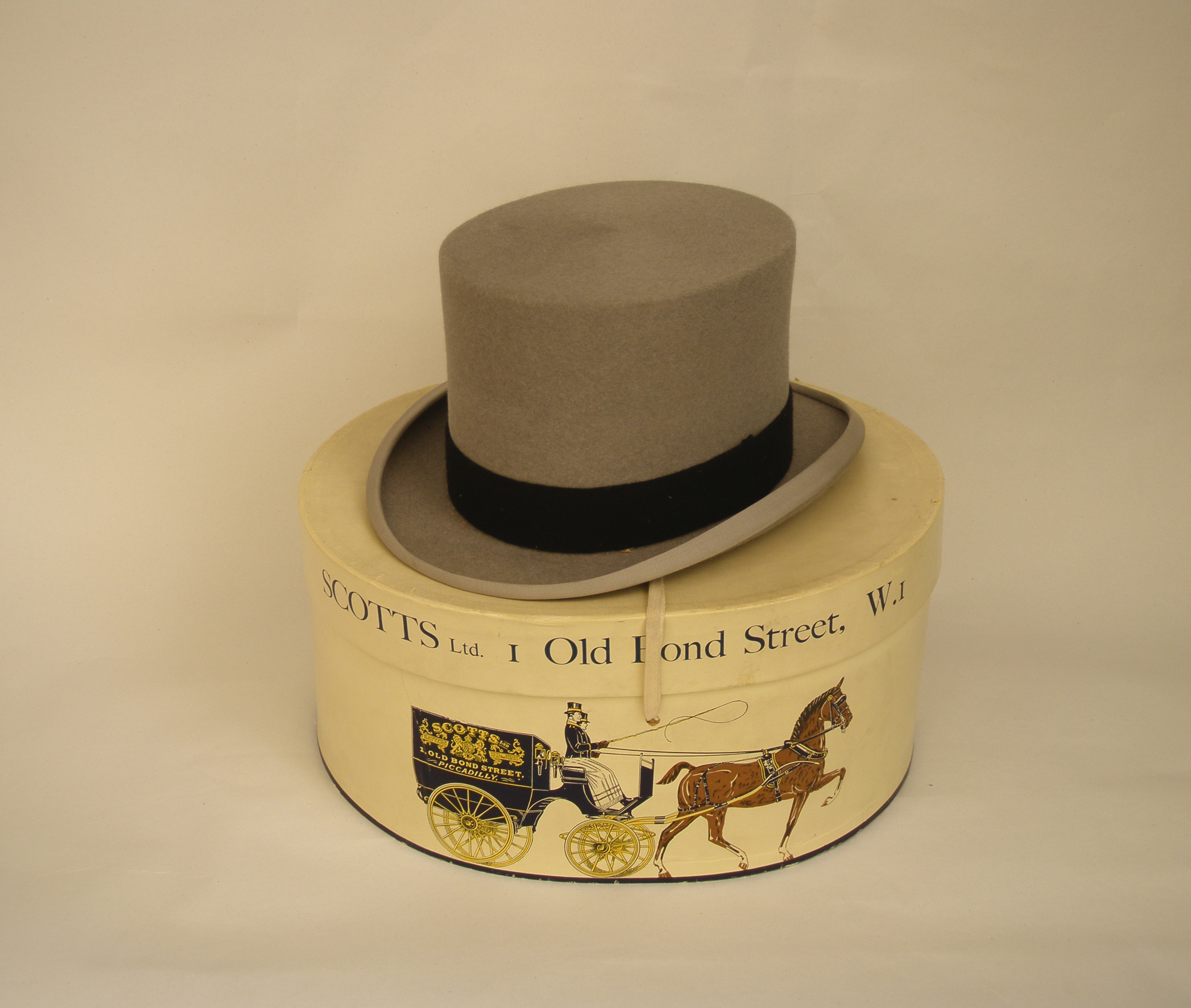 Ημίψηλο από γκρι τσόχα. Αγγλία. Δεκαετία 19501992.6.114 / Συλλογή Πελοποννησιακού Λαογραφικού Ιδρύματος